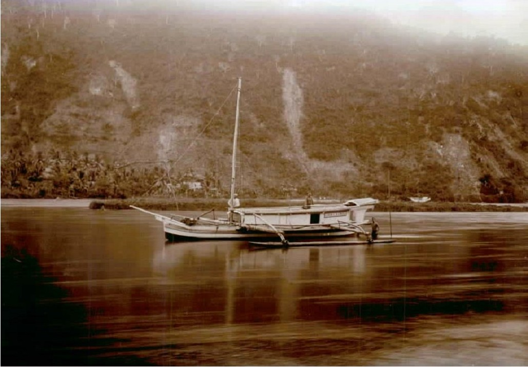 Perahu bercadik sedang berlabuh di Teluk Gorontalo